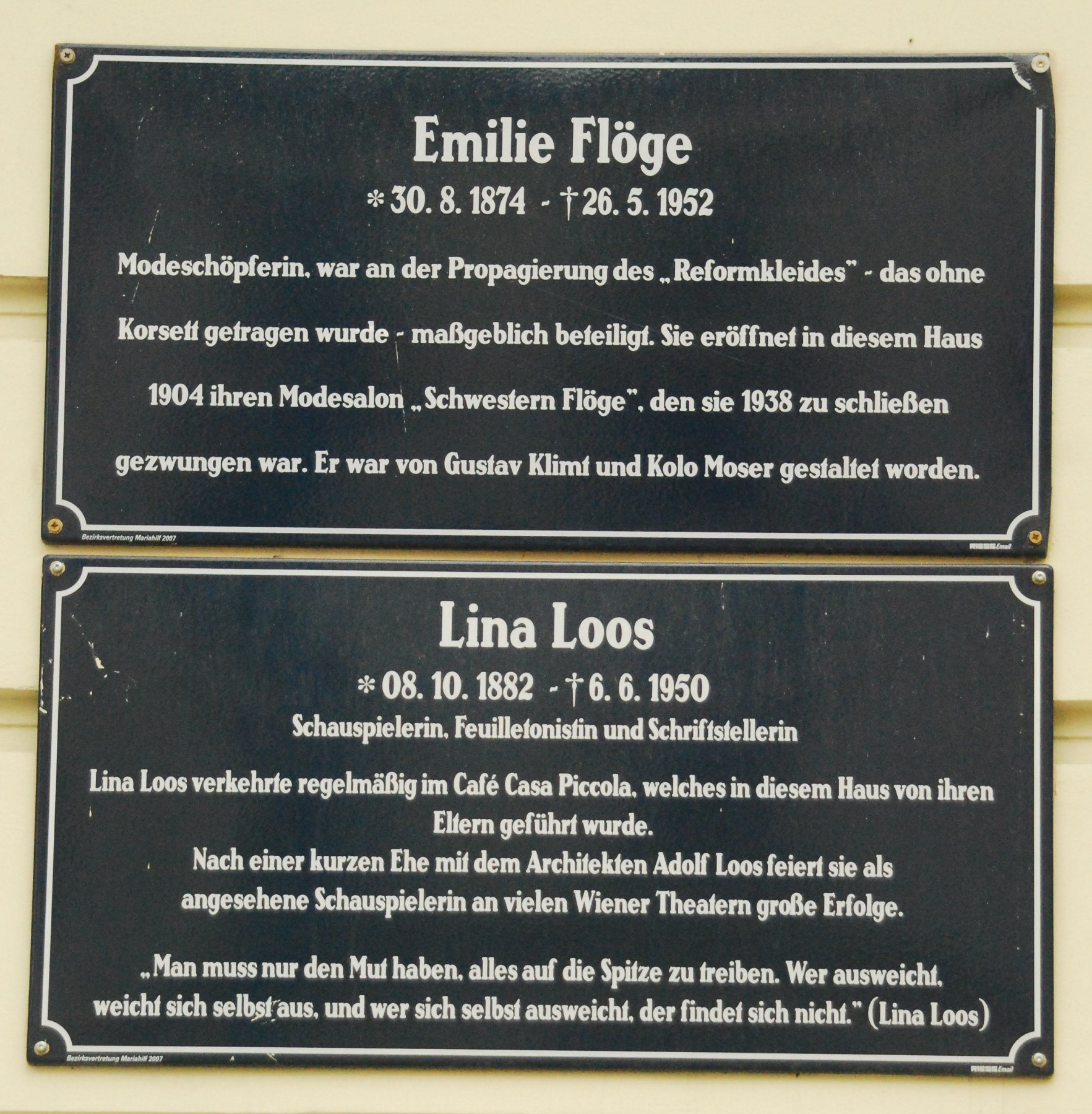 Gedenktafeln für Emilie Flöge und Lina Loos in der Mariahilfer Straße in Wien